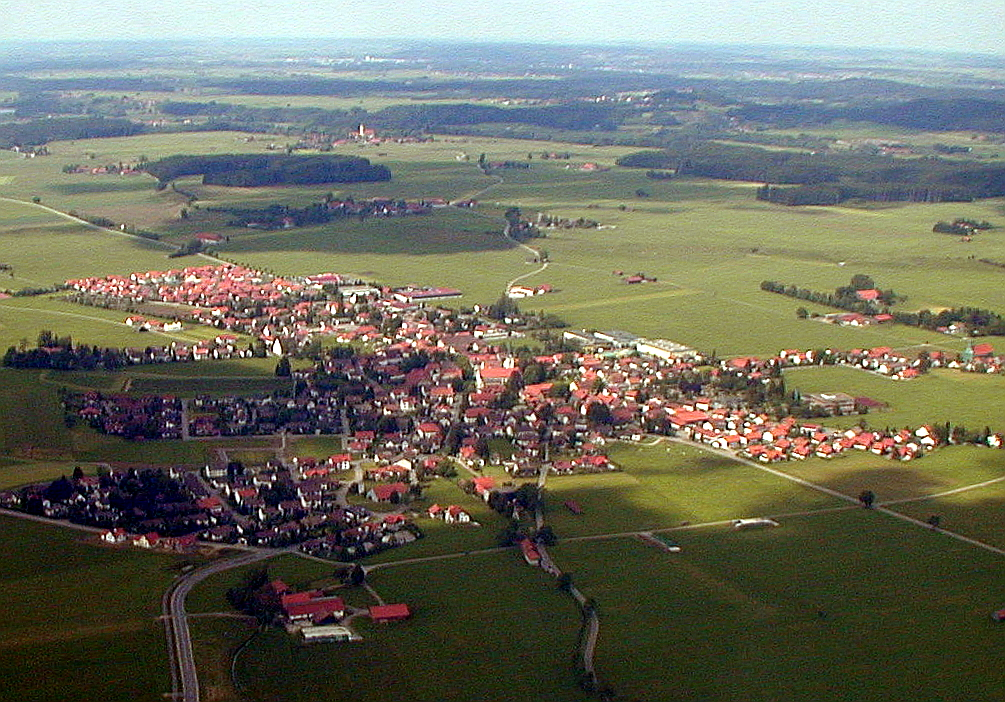 87764 Legau (Unterallgäu)